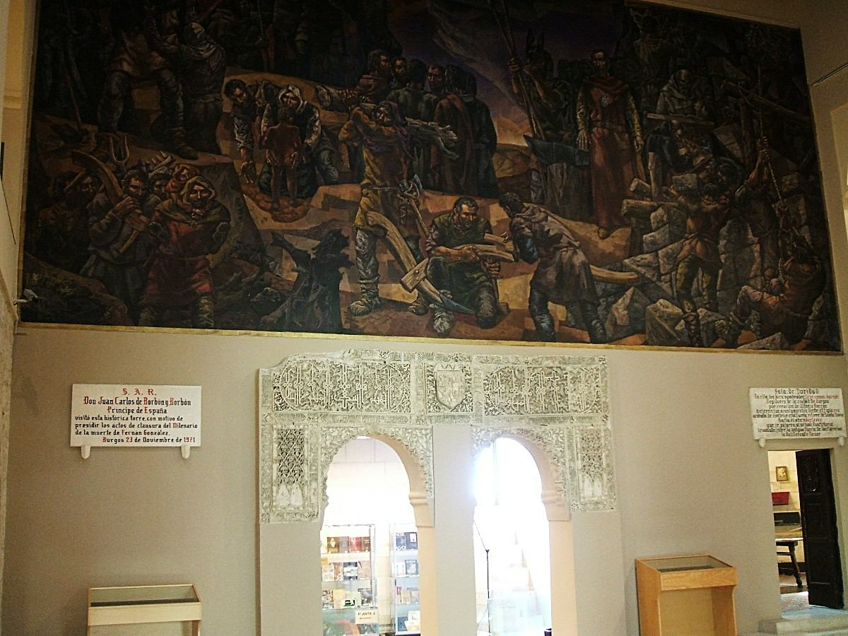 Arco de Santa María, Burgos. Yeserías y Mural de Vela Zanetti